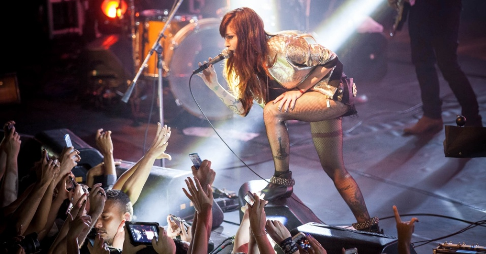 Show da Cantora Pitty